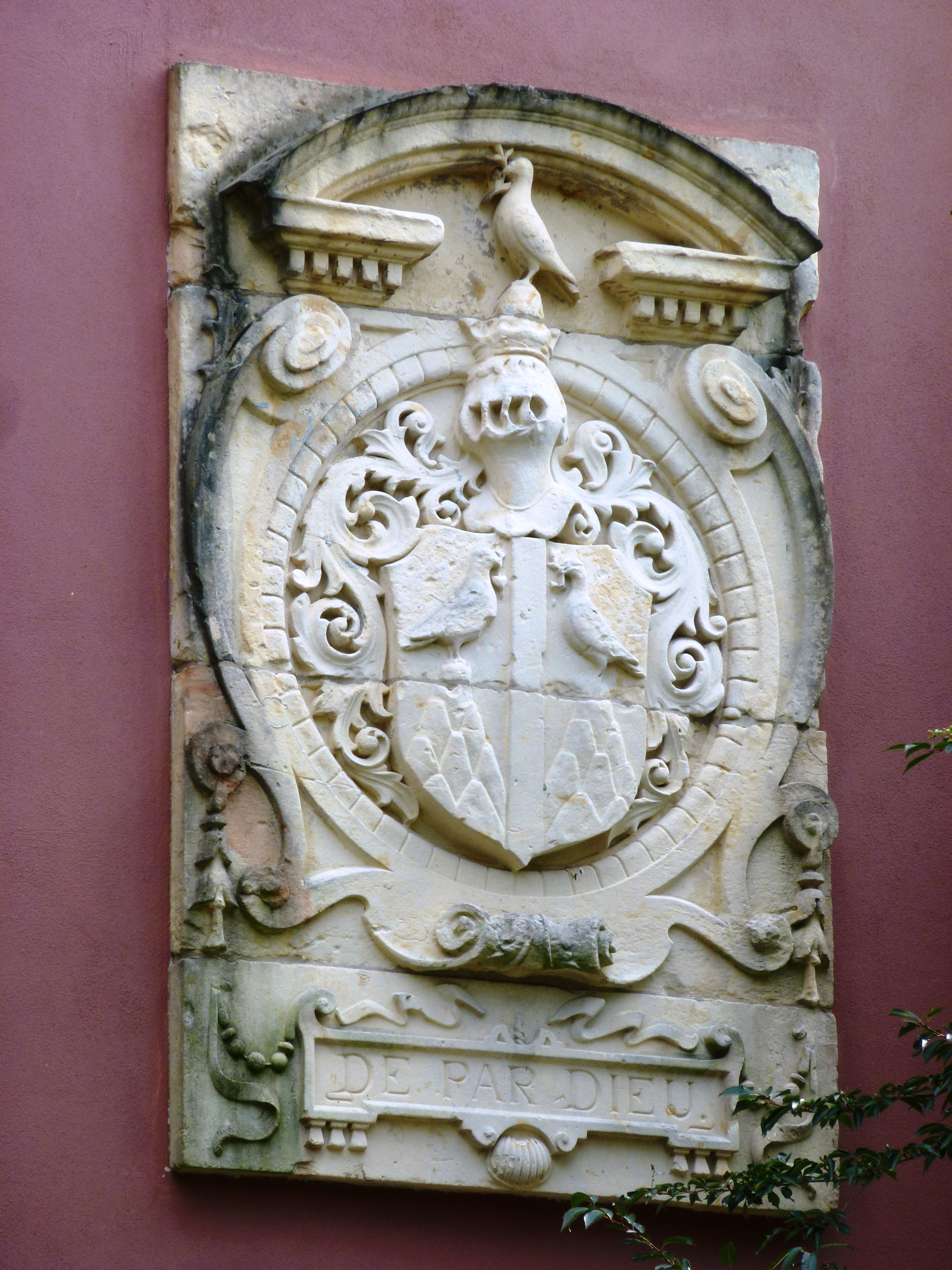 Nijmegen Villa Villandry (Villandry 50 tm 60) wapen op gevel